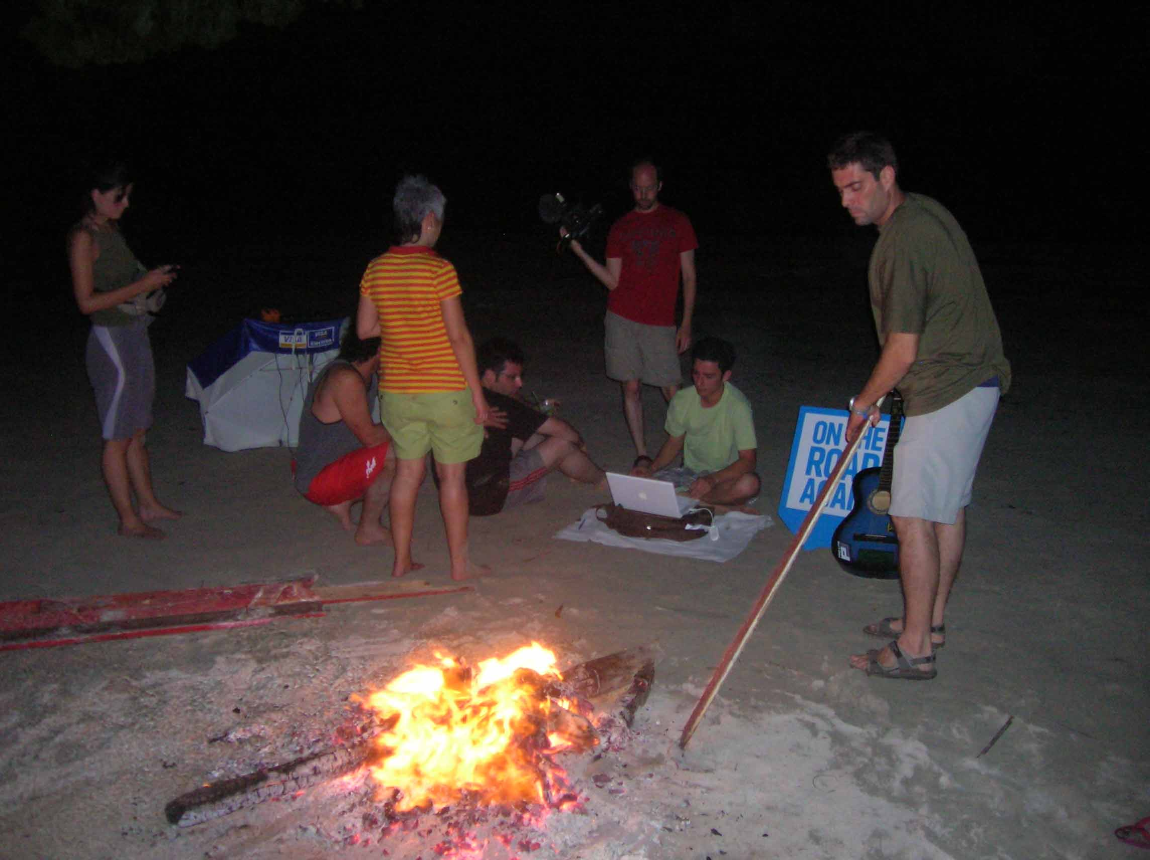 Imagem de um luau no Brasil